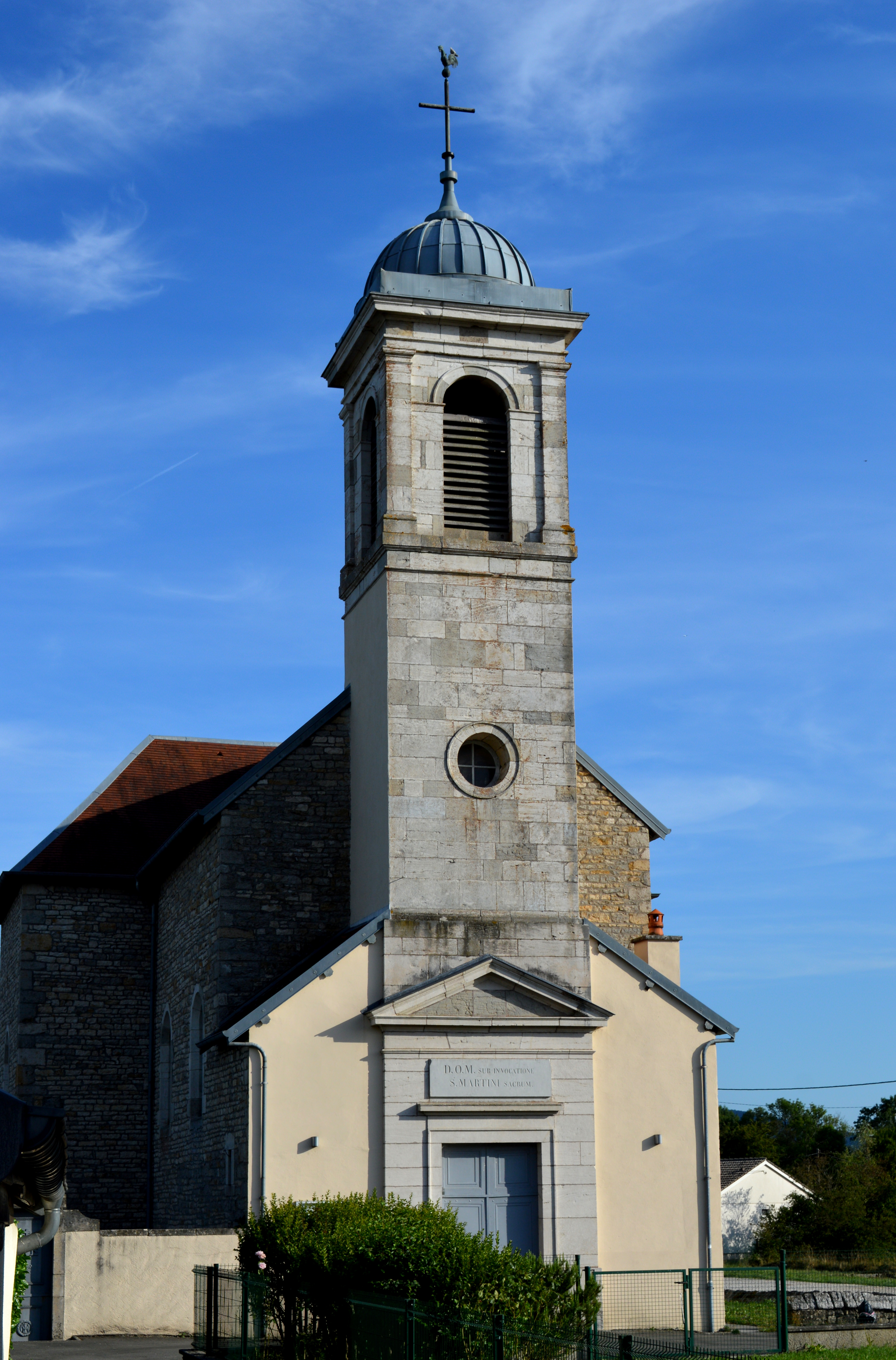 Façade principale et clocher de l'église Saint-Martin de Routelle, commune déléguée de la commune d'Osselle-Routelle dans le département du Doubs.